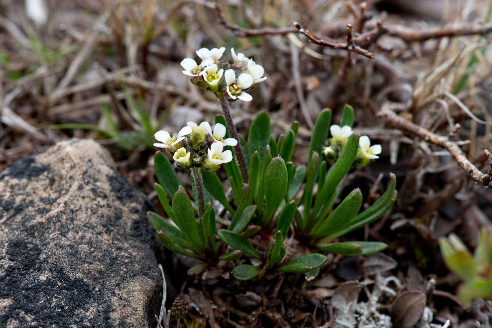 Long's braya,Braya longii